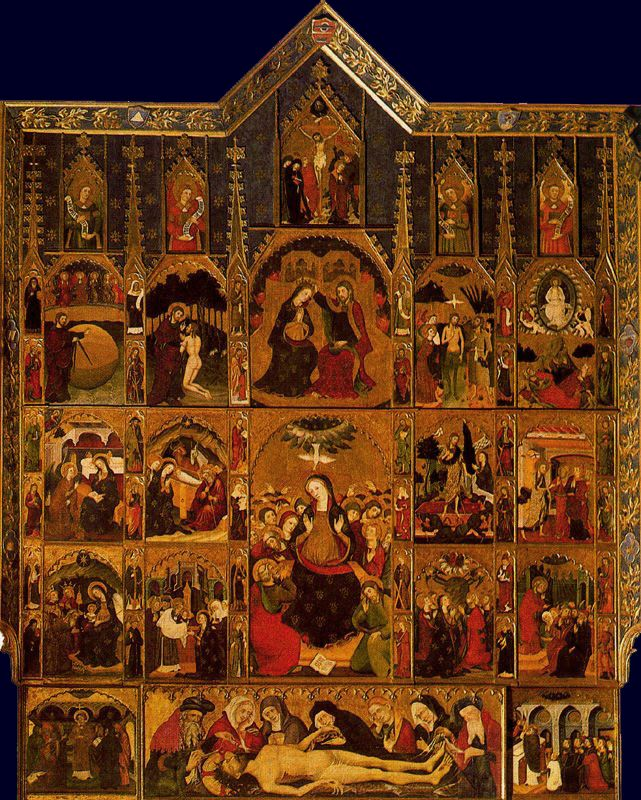 Pere Serra, Retablo de la Pentecostés, hacia 1394, Catedral de Manresa.